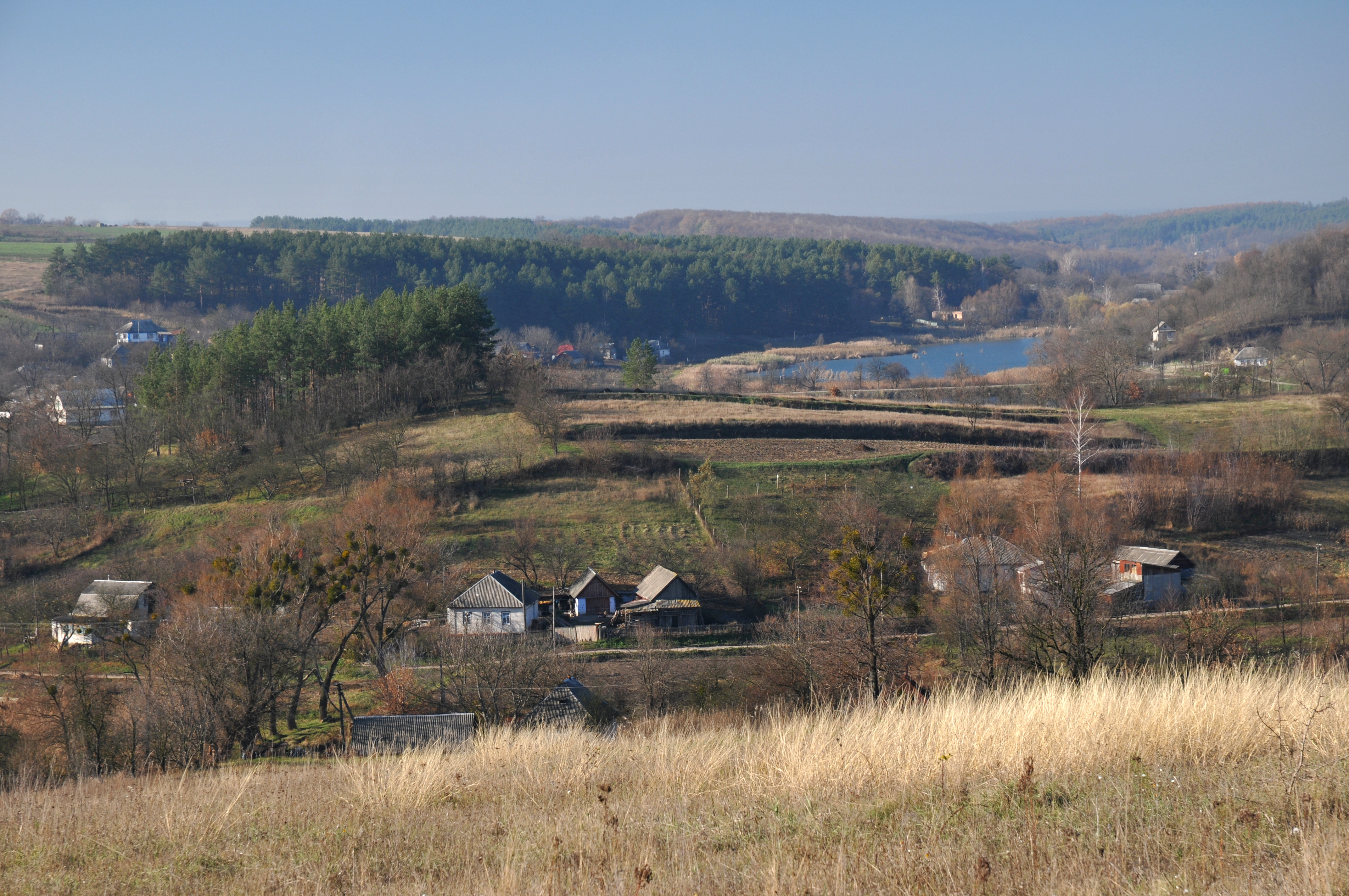 с. Сунки (Смілянський район, Черкаська область)